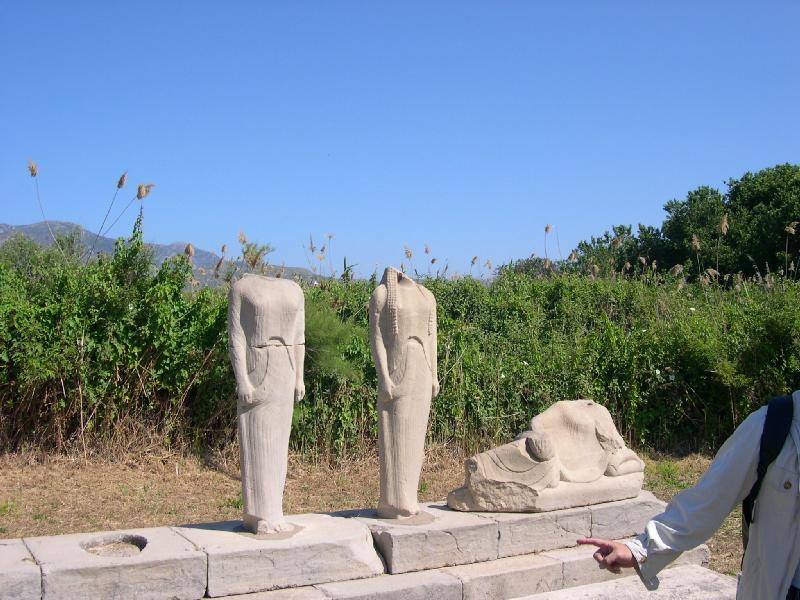 Estatuas, cerca del Heraion de Samos. Isla de Samos, Grecia